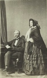 М. М. Нарышкин с женой